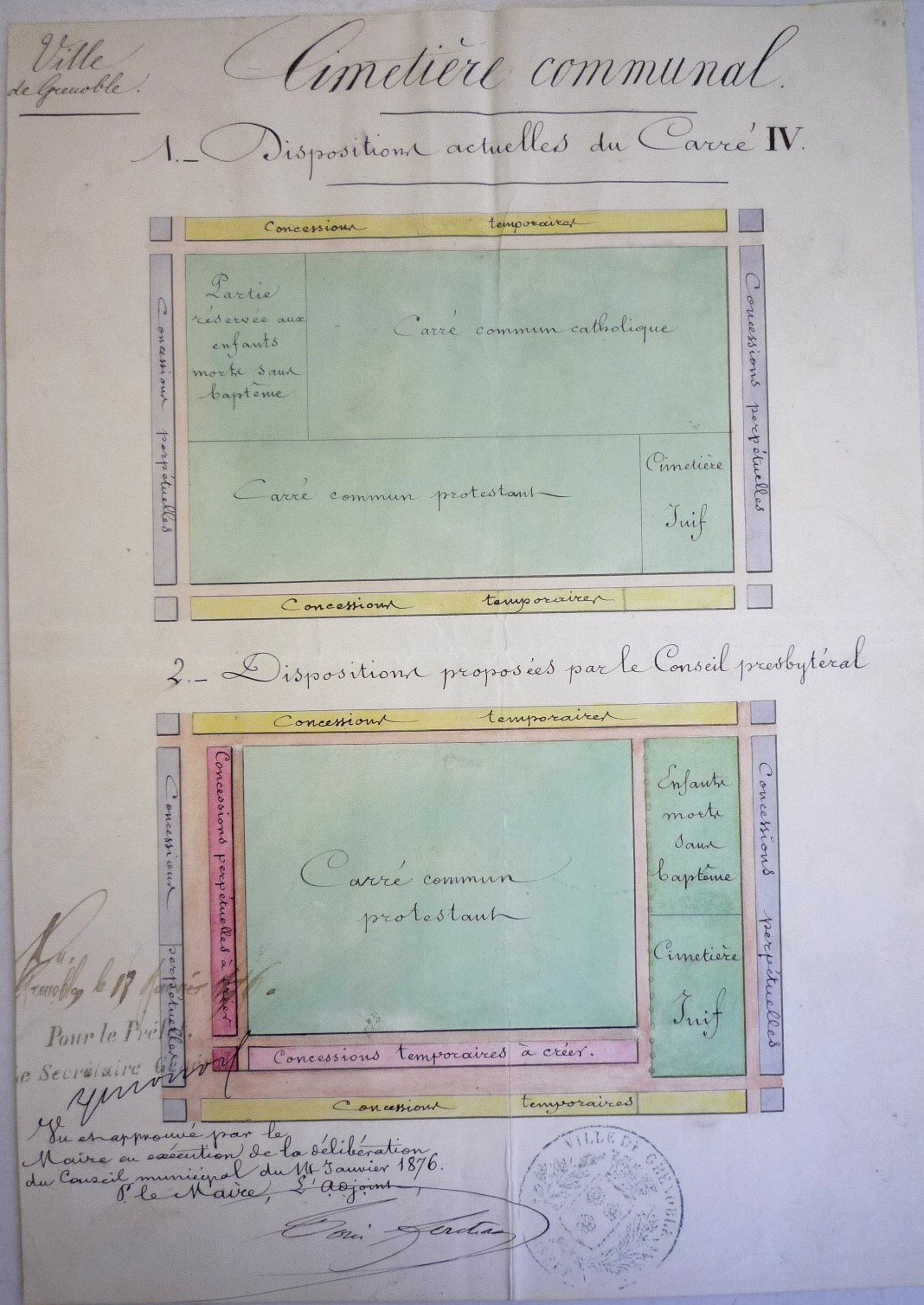 Plan d'agrandissement des protestants sur le carré IV du cimetière Saint-Roch à Grenoble